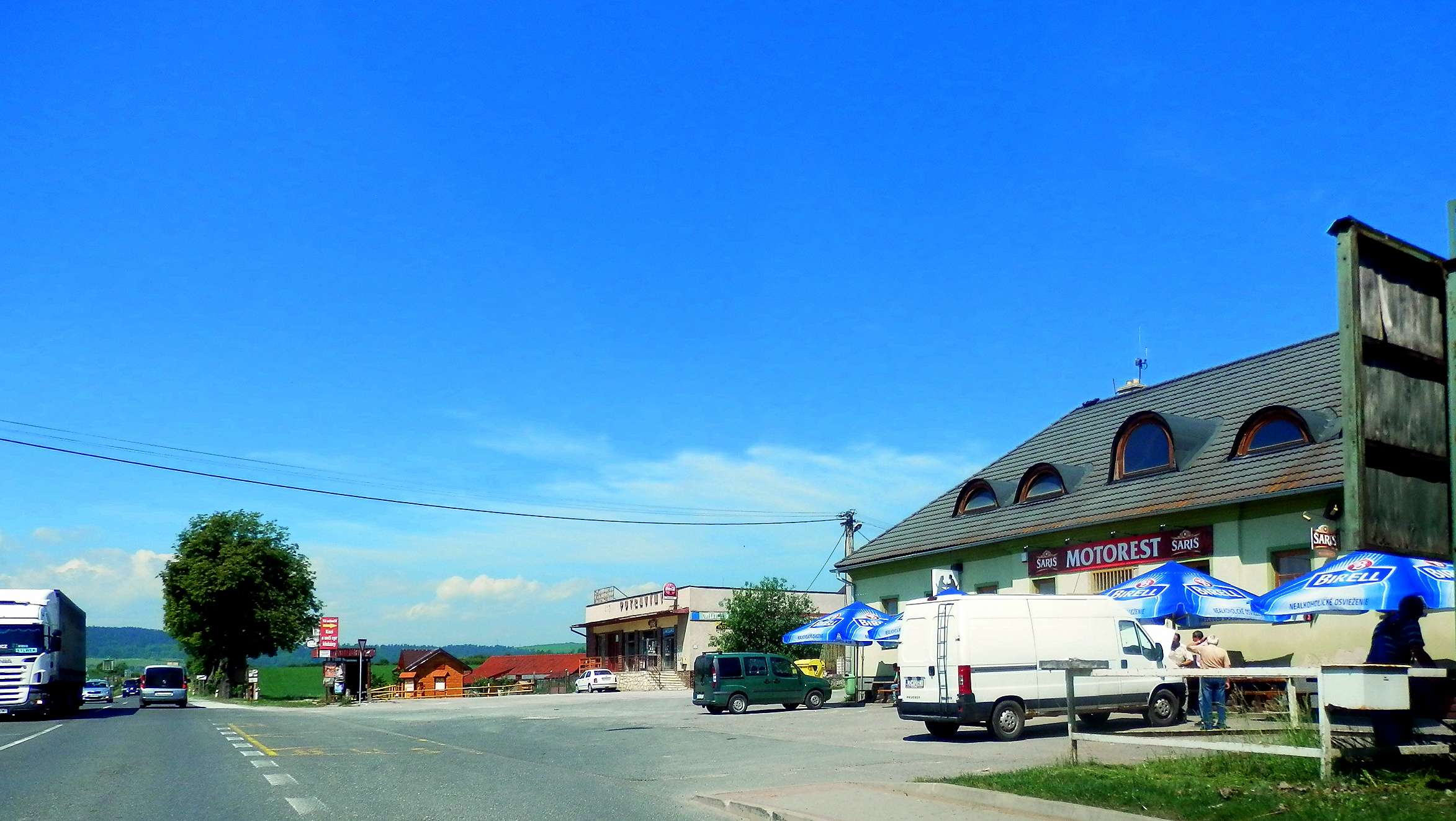 Obec Klčov. Okres Levoča